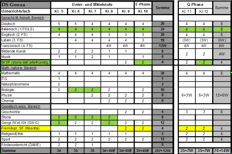 Stundentafel DSG